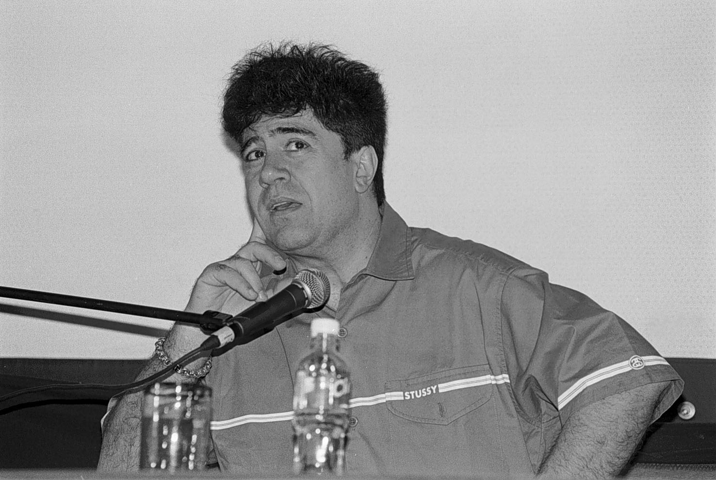 98 03 02 arte y gente cine pedro almodovar director de cine en rueda de prensa en el centro de estudios para extranjeros. Foto antonio romero gonzalez